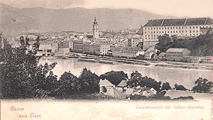 Schloßkaserne in Linz